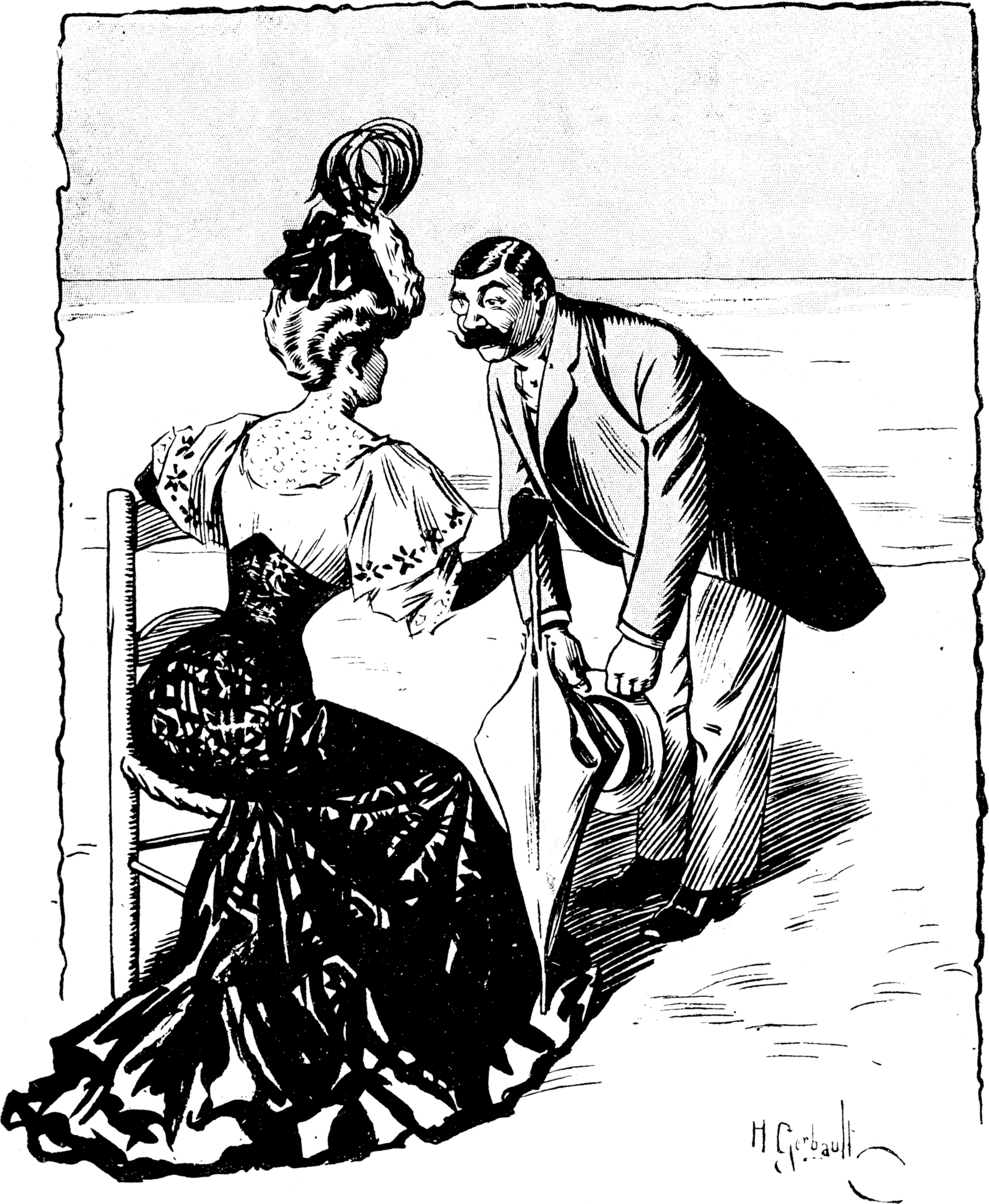 BIENSÉANCE— Quelle toilette sombre! Vous êtes en deuil, chère madame?— Mon mari a perdu sa maîtresse.